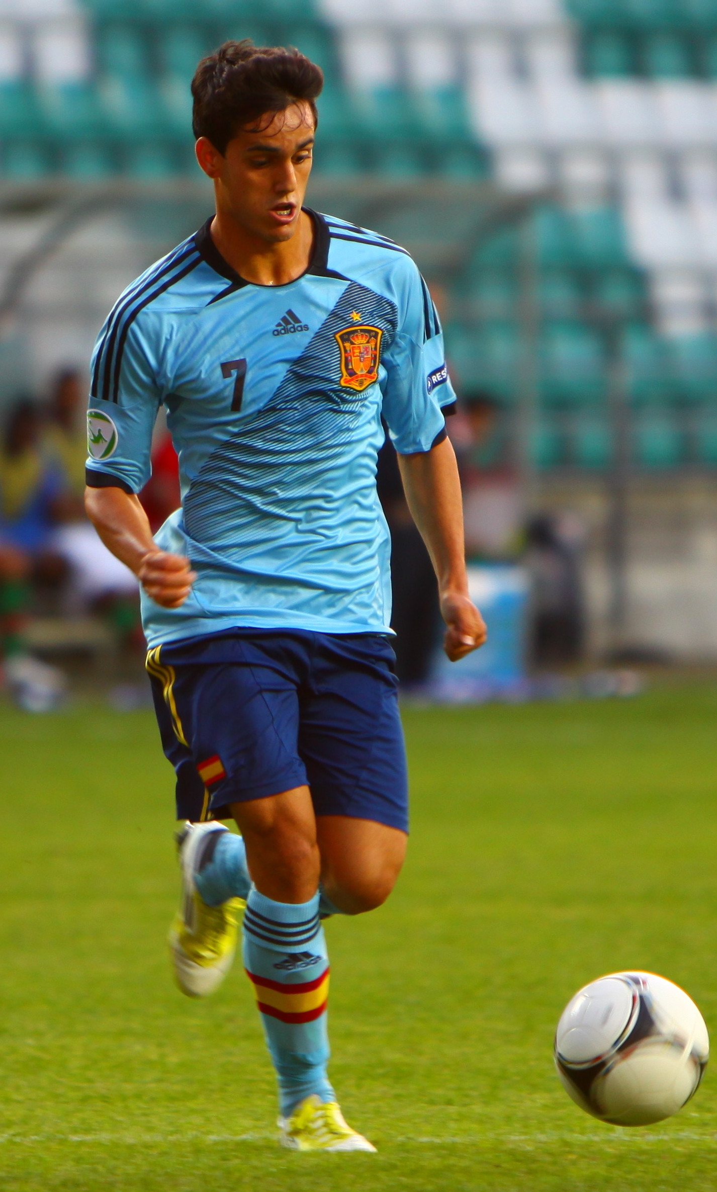 U-19 Portugal vs Spain.